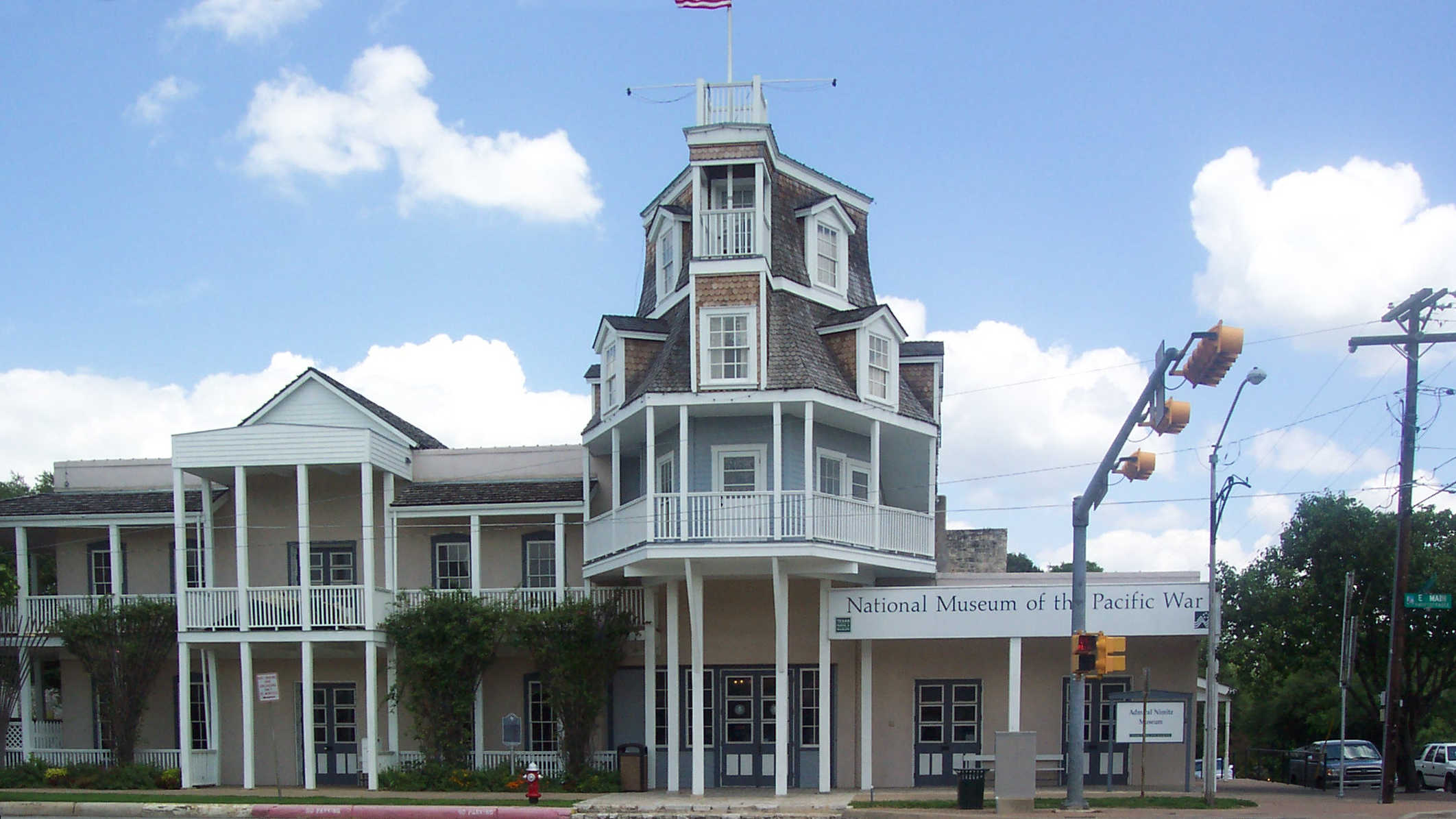 Musee Nimitz a Fredericksburg, au Texas, Maison de l'amiral